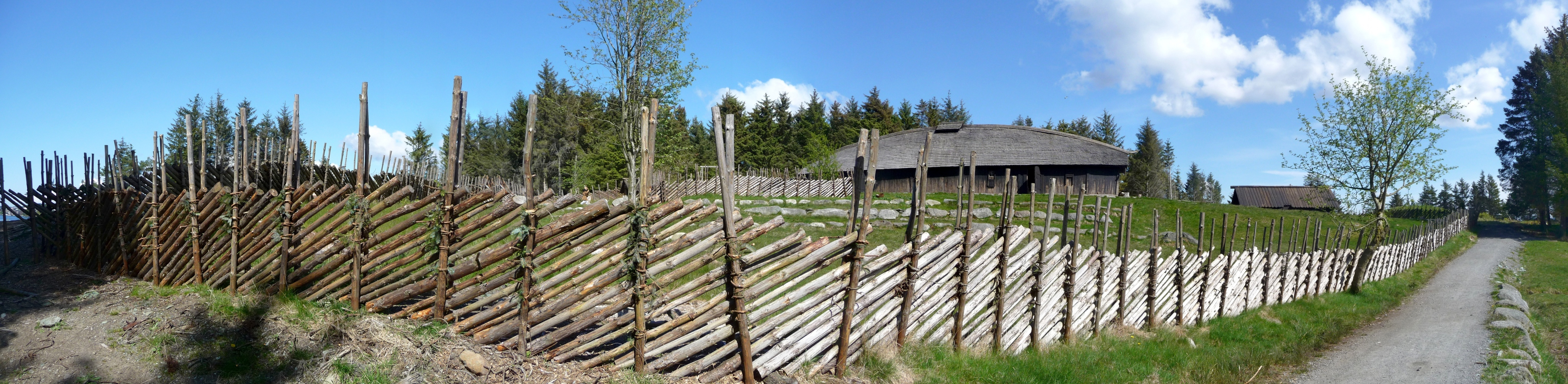 The Viking Farm, Avaldsnes 05.2010